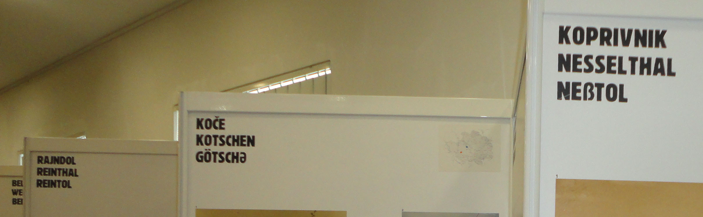 Krajevna imena na Kočevskem v slovenščini, nemščini in kočevarščini